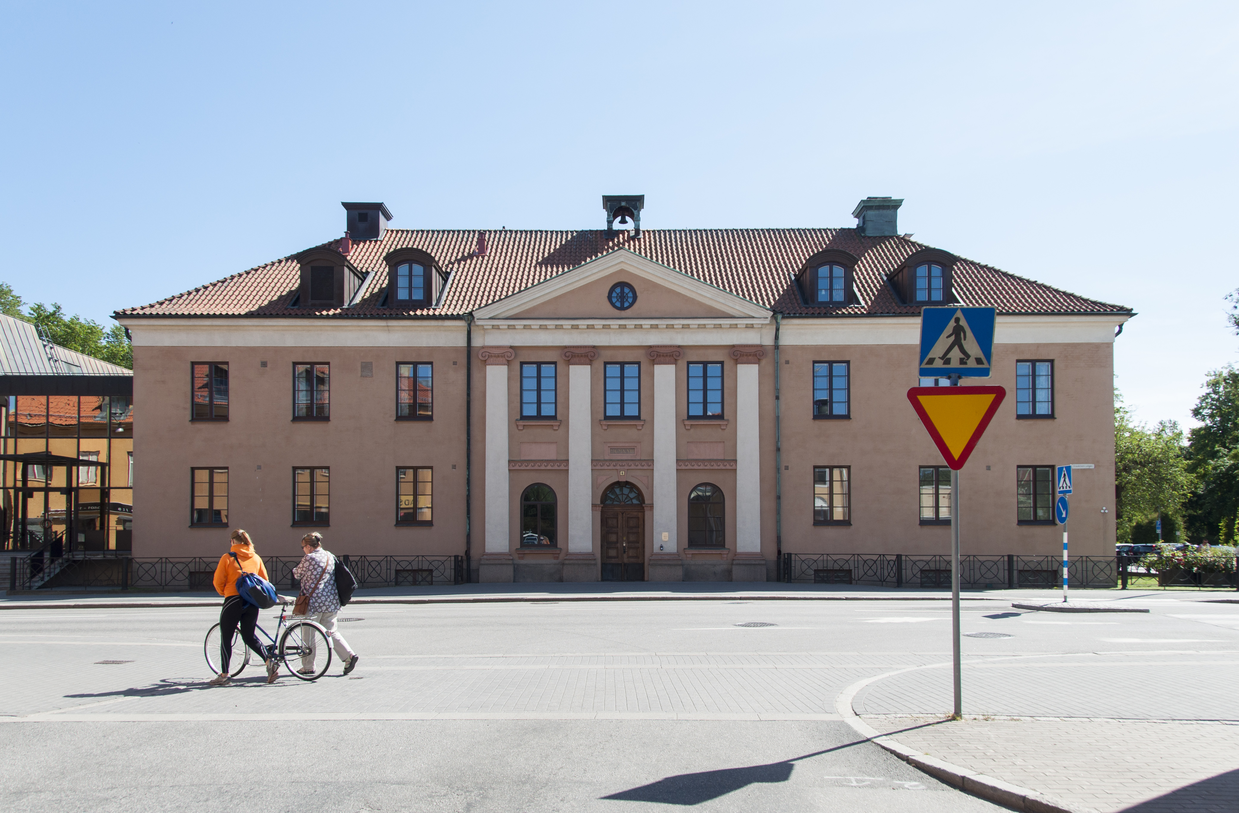 Tingshuset i Mariestad, Nybyggnadsår 1923, Gotthard Ålander (Arkitekt) Sven Ljungvall (Byggmästare)